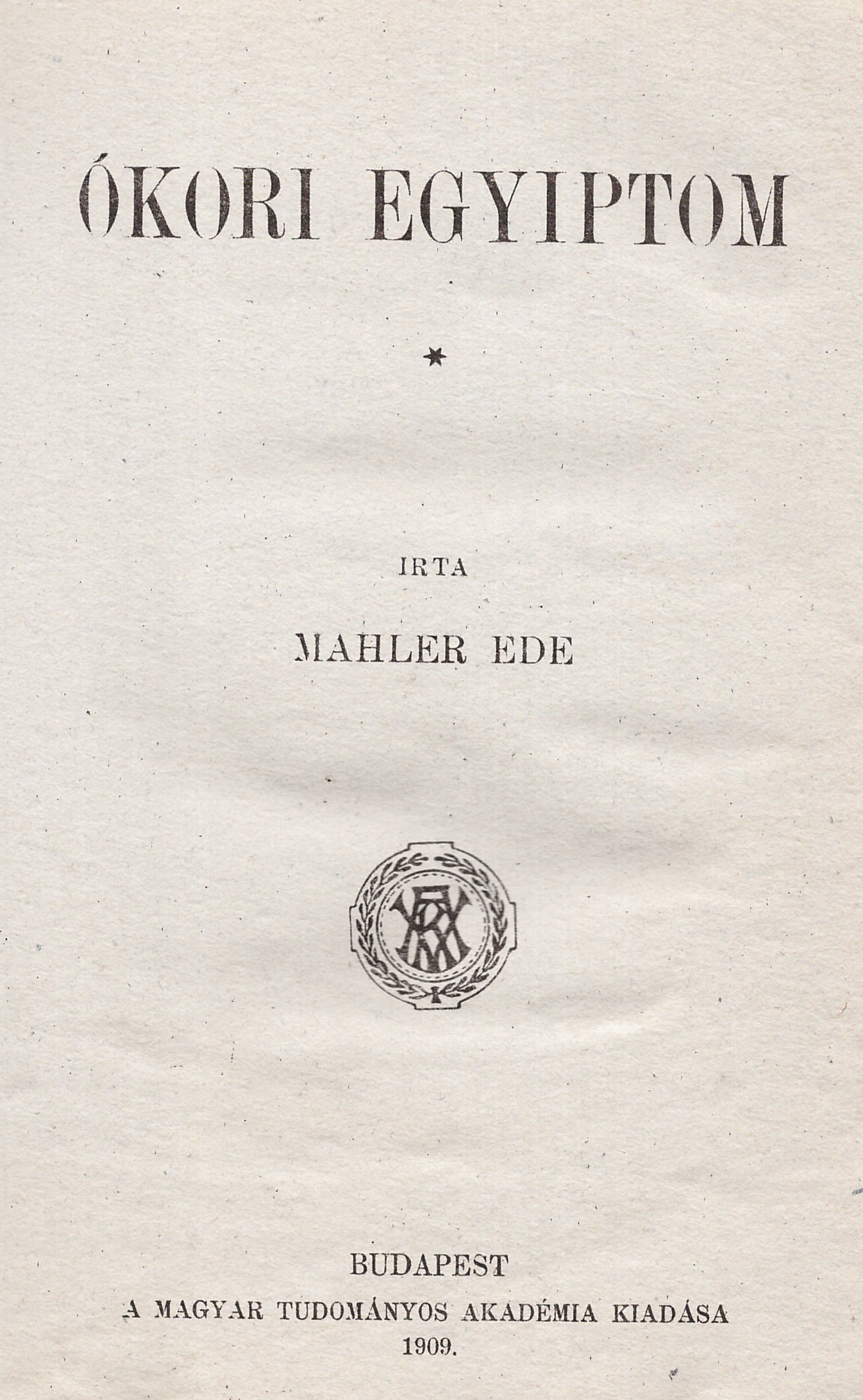 Mahler Ede (1857-1945): Ókori Egyiptom (1909)